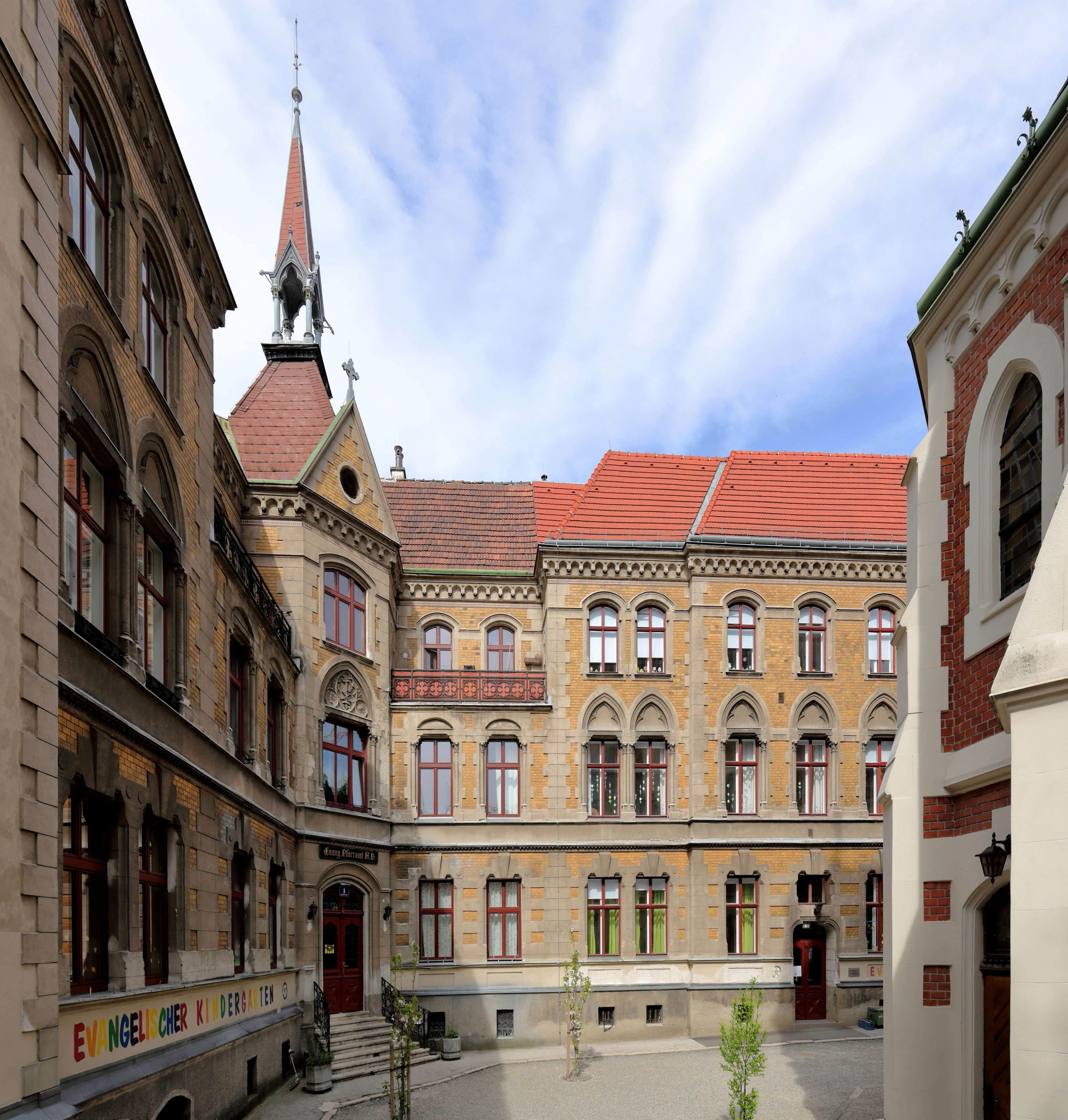 Der Lutherhof im 18. Wiener Gemeindebezirk Währing.Der Lutherhof, ein Pfarrhaus mit Schule und Wohnungen, wurde nach Plänen der Architekten Theodor Bach und Ludwig Schöne errichtet. Am 24. Juni 1894 fand die feierliche Grundsteinlegung des Pfarrhauses statt, das im April 1895 bereits bezogen werden konnte.